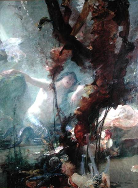 « La sirène » peinture d'Albert Maignan. Huile sur toile, 135.2 x 98.7 cm.